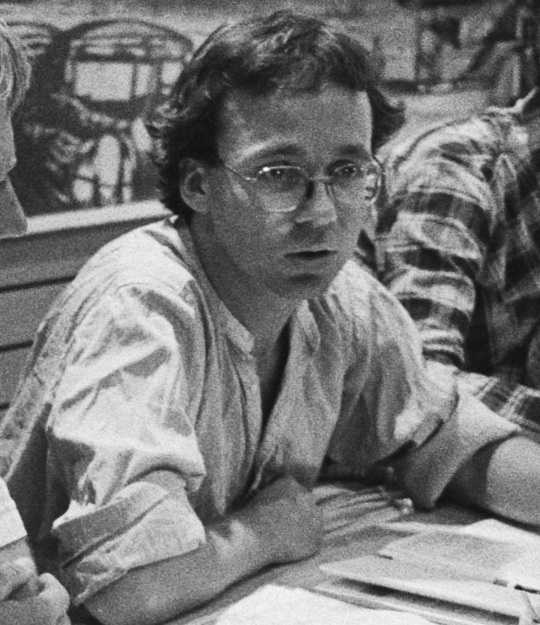 Collectie / Archief : Fotocollectie Anefo Reportage / Serie : Persconferentie over het initiatief tot een links samenwerkingsverband tussen CPN, PSP en PPR voor een "linkse doorbraak" Beschrijving : V.l.n.r. Dhr. Jacques Lunel, dhr. Jan Bosman, dhr. Joost Divendal en dhr. Frank Köhler (PSP) Datum : 1 september 1983 Trefwoorden : persconferenties, politici, politieke partijen, samenwerking Persoonsnaam : Bosman, J., Divendal, Joost, Köhler, F., Lunel, Jacques Instellingsnaam : CPN, PPR Fotograaf : Croes, Rob C. / Anefo Auteursrechthebbende : Nationaal Archief Materiaalsoort : Negatief (zwart/wit) Nummer archiefinventaris : bekijk toegang 2.24.01.05 Bestanddeelnummer : 932-6842